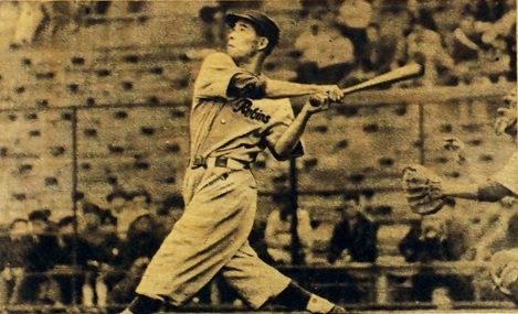 松竹ロビンス時代の小鶴誠